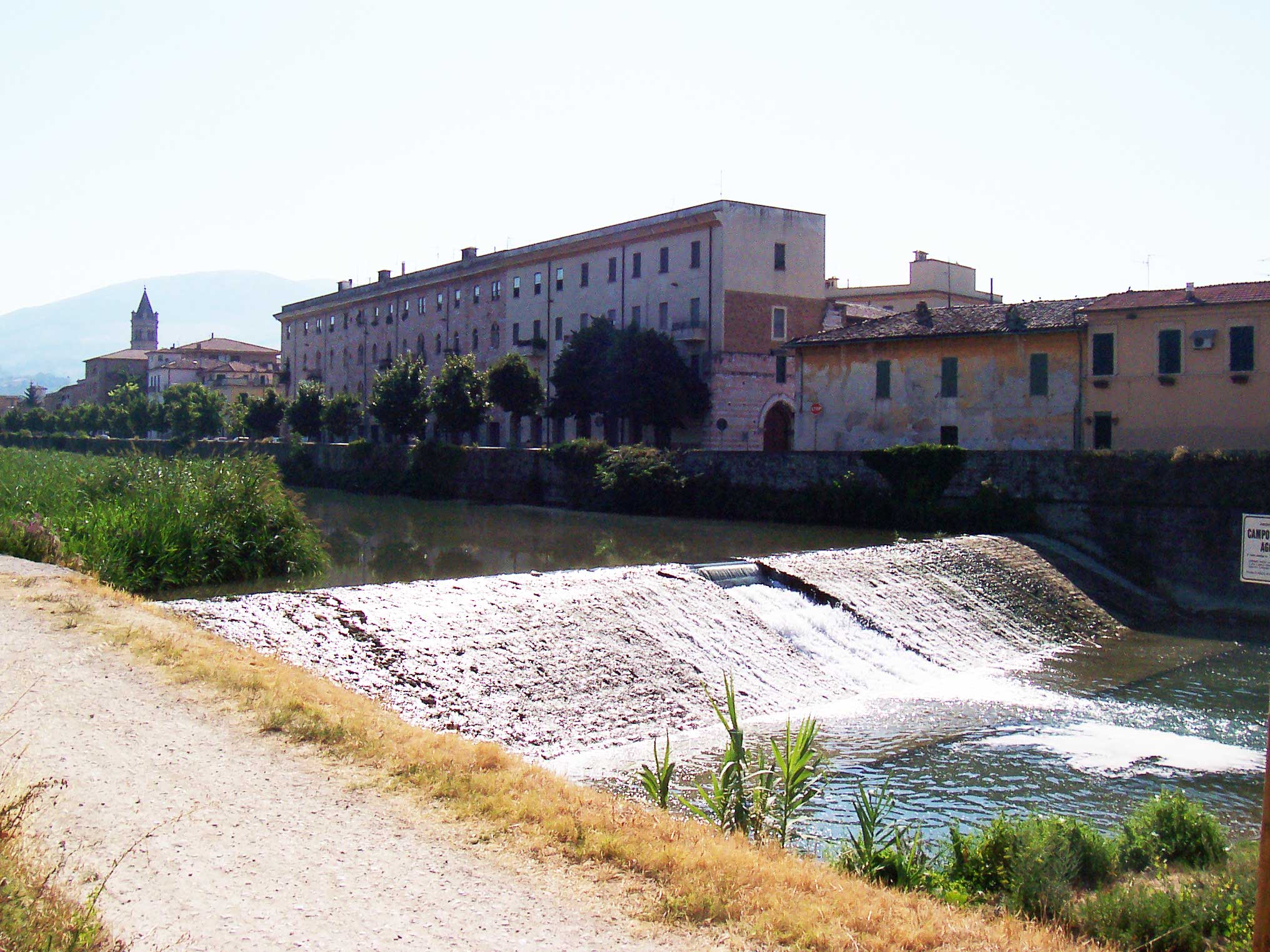 Categoria:Immagini Foligno